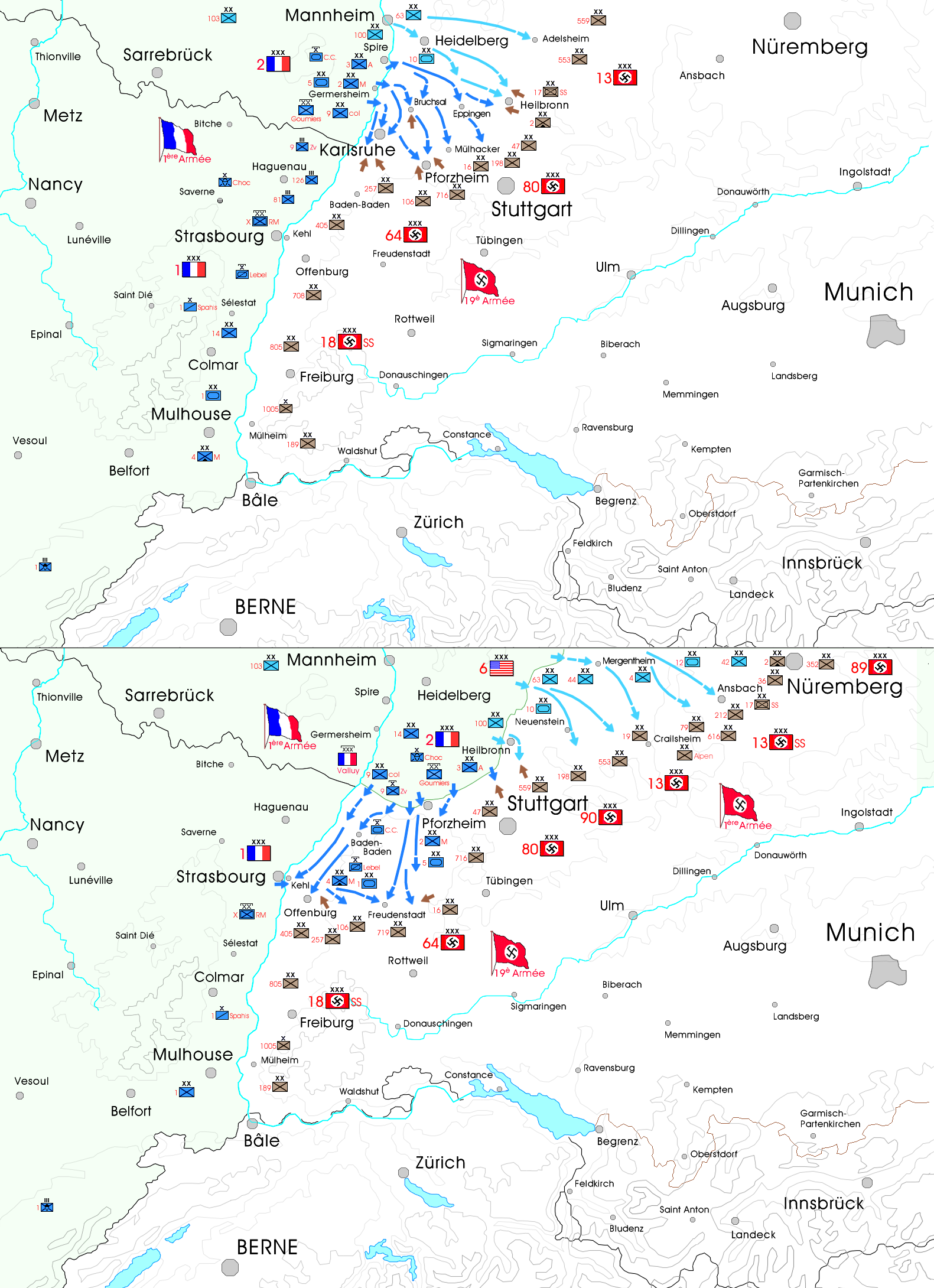 Rhin et Danube : traversée du Rhin, prise de Karlsruhe, dégagement de Strasbourg et manoeuvre de Freudenstadt, 31 mars - 17 avril 1945